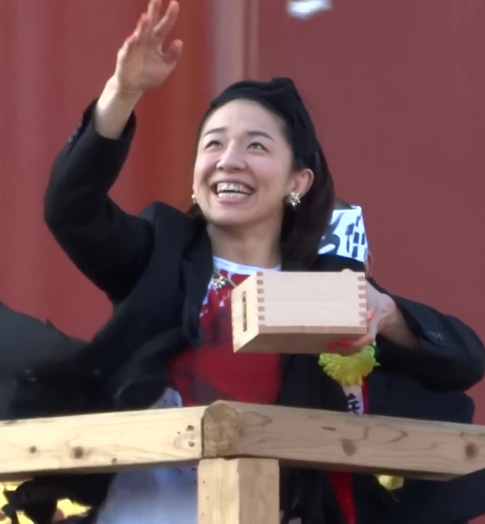 浅草 浅草寺節分会 2015 浜口京子 アニマル浜口 浅草観音文化芸能人節分会 2015